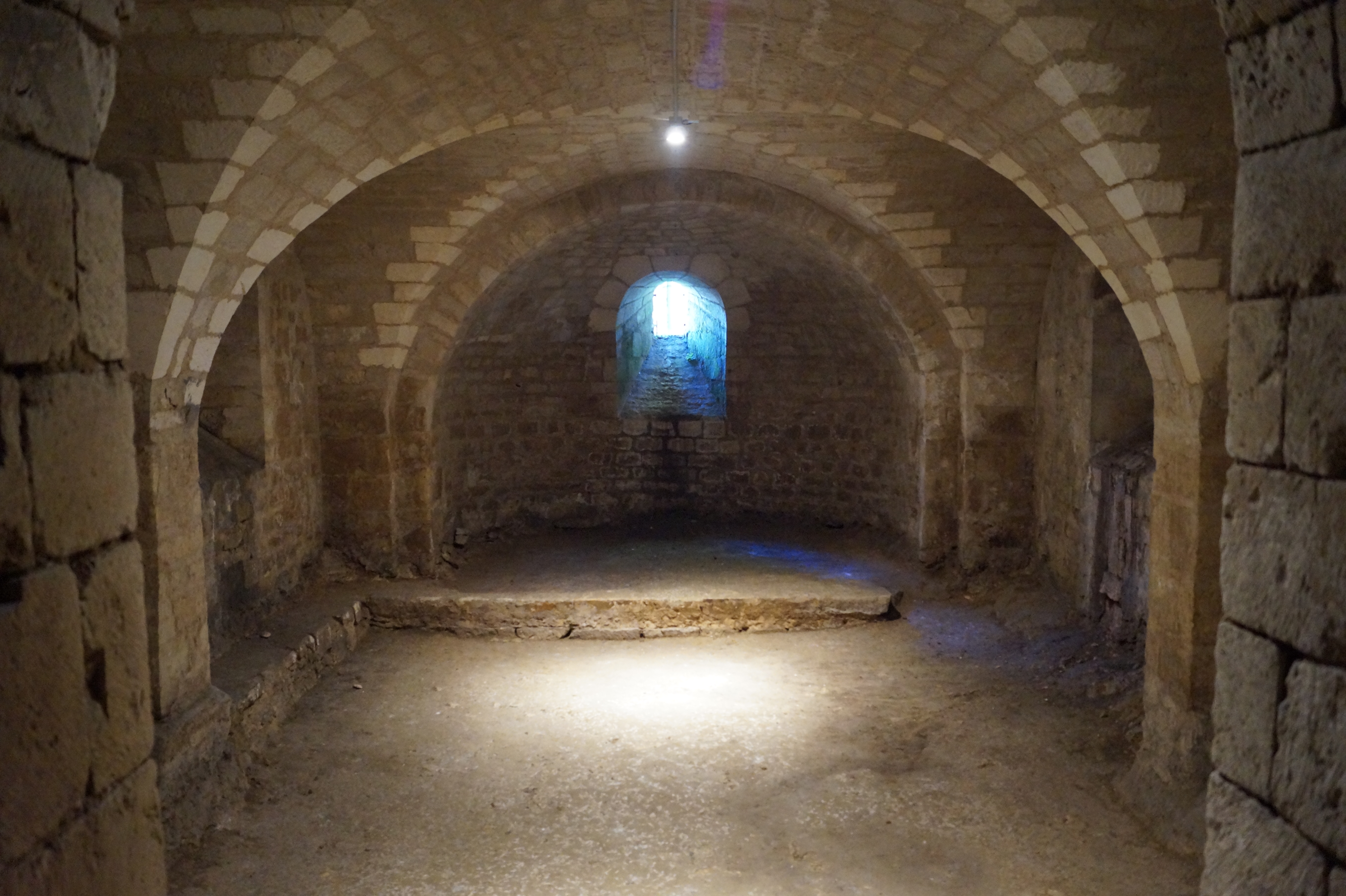 La crypte de l’église Notre-Dame-des-Anges.